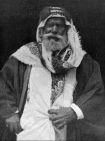 صورة قديمة من كتاب عرب الصحراء للمؤلف هارولد ديكسون صاحب الصورة هلال فجحان المطيري تاجر لؤلؤ شهير توفي عام 1938